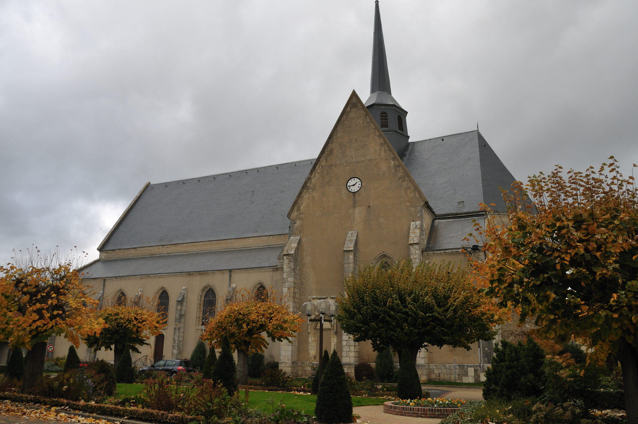 Église Saint-Étienne, Coullons, Loiret, France